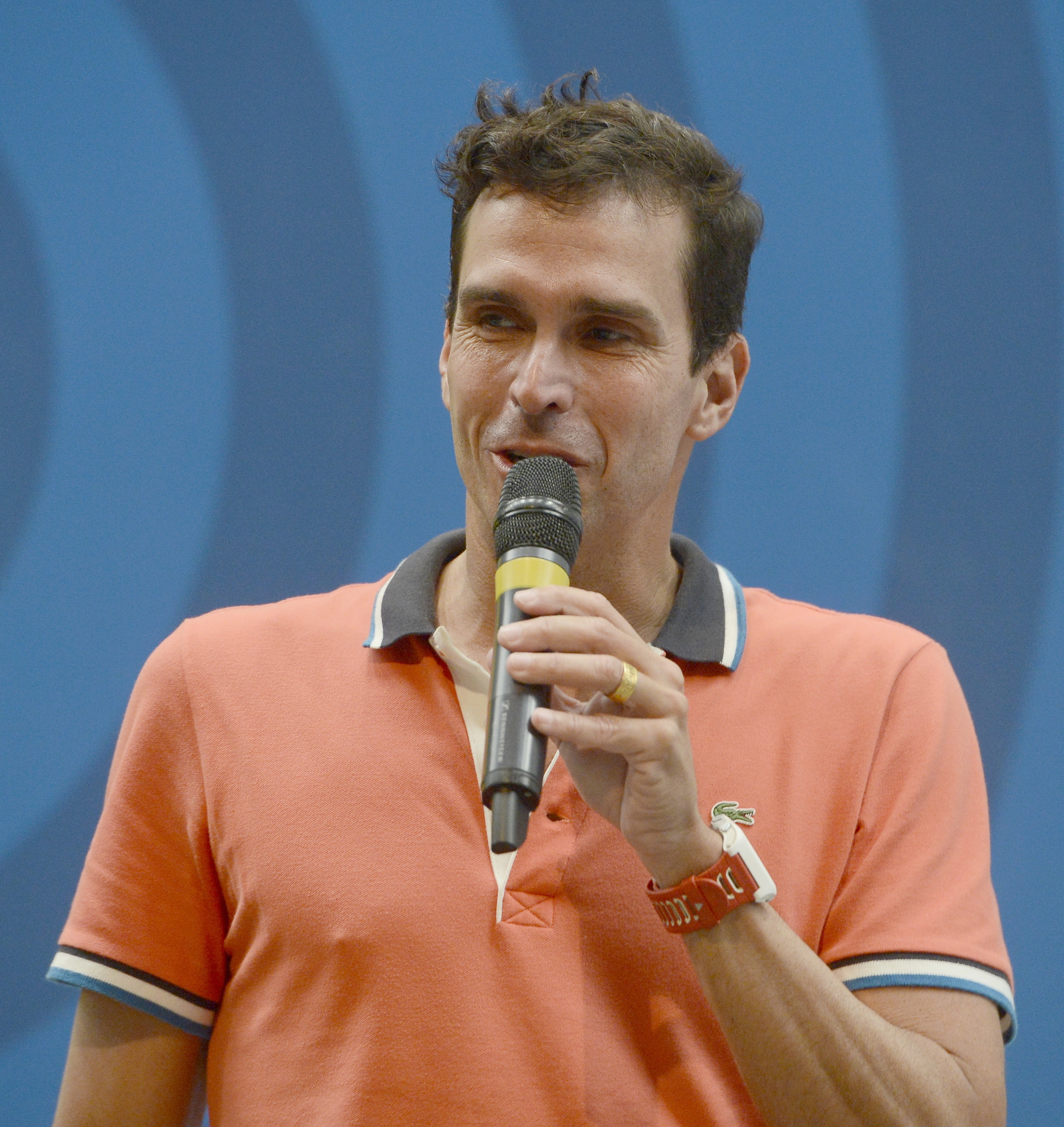 Rio de Janeiro - O secretário nacional de Esporte de Alto Rendimento do ministério, o ex-atleta e ex-bolsista Luiz Lima fala durante bate-papo sobre o programa Bolsa Atleta (Tomaz Silva/Agência Brasil)